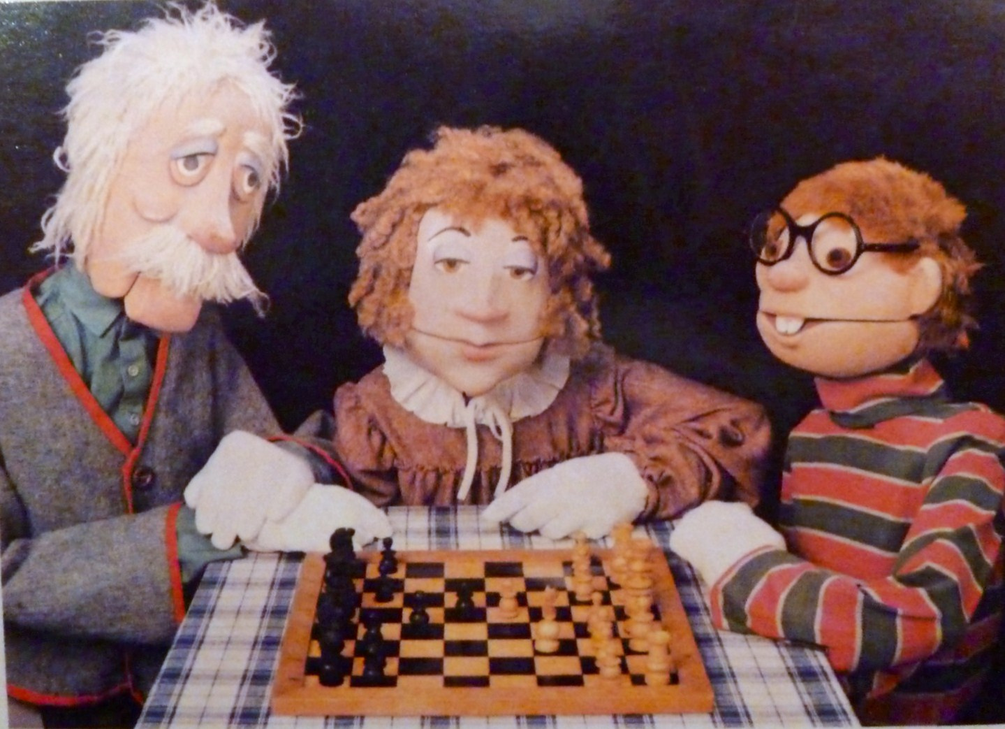 Die Puppen Opa, Tante Bernie und Emil zur Fernsehserie Zug um Zug - Schach für jederman des WDR (Redaktion Claus Spahn).